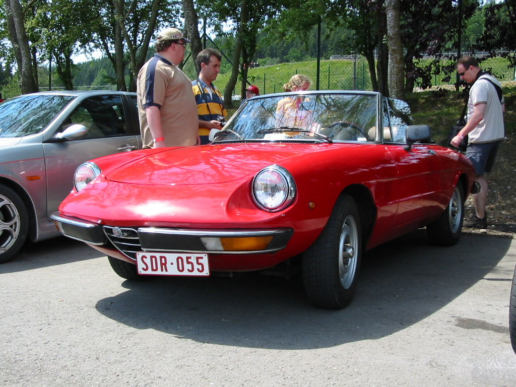 Alfa Romeo Spider 2000 Veloce